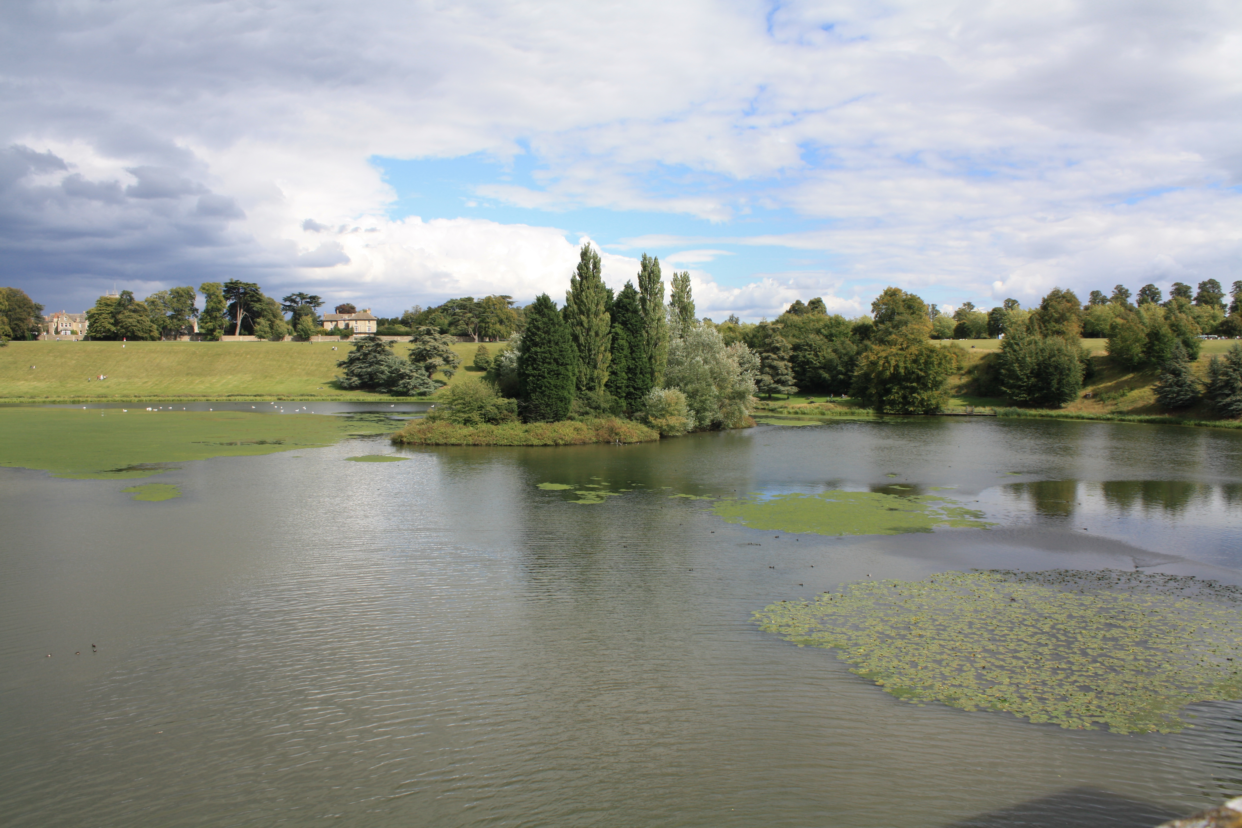 Blenheim Palace Park & Lake